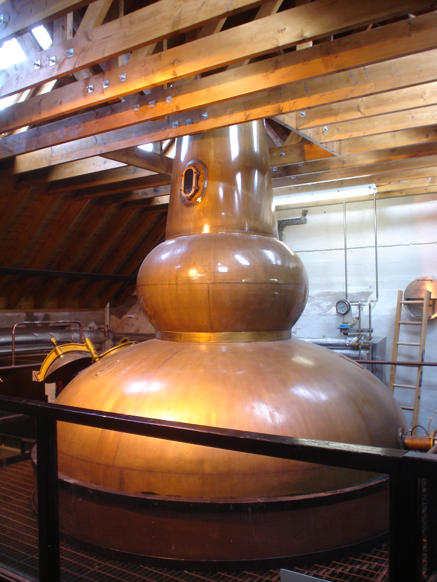 Glenturret distillery